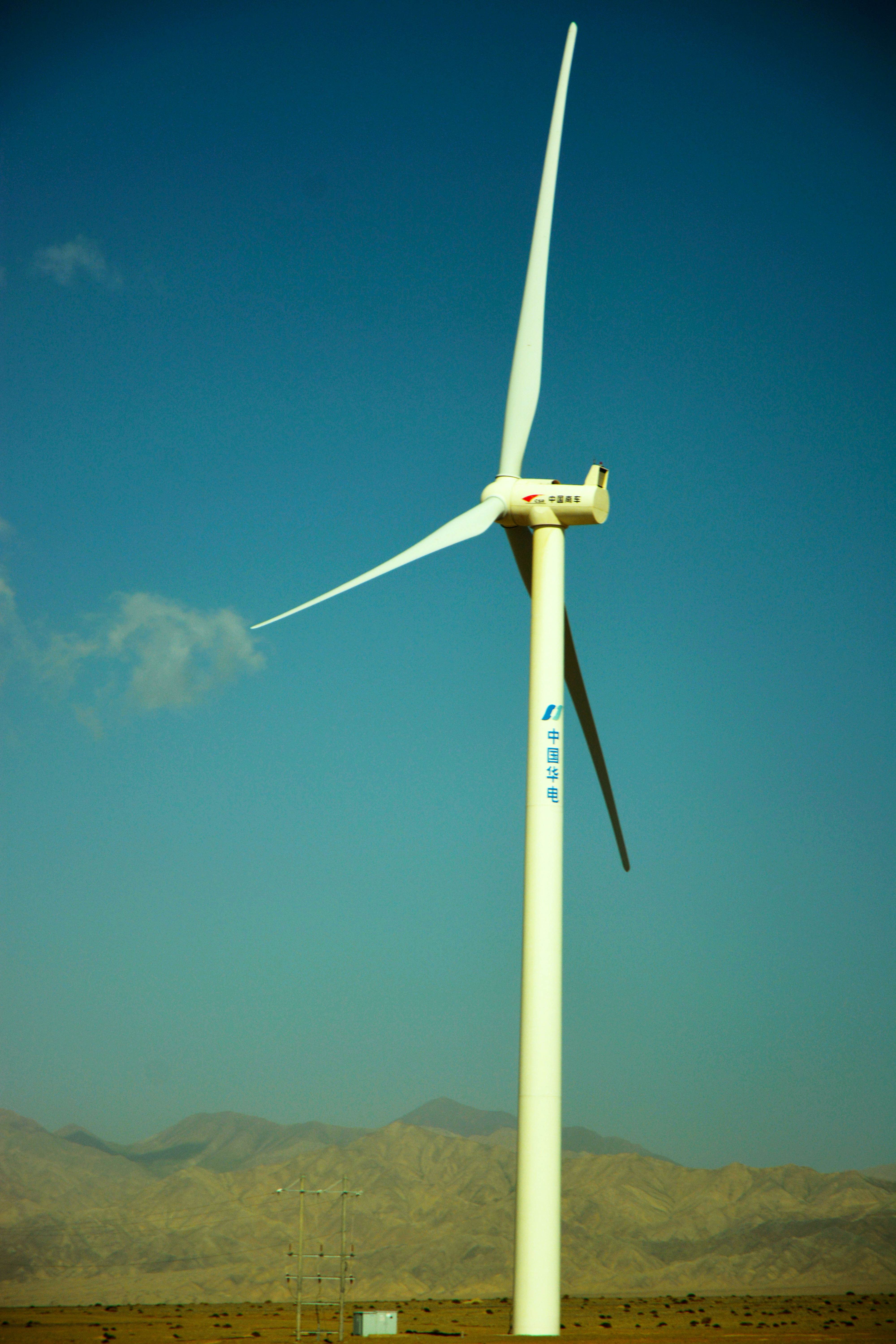 甘肃的风力发电场